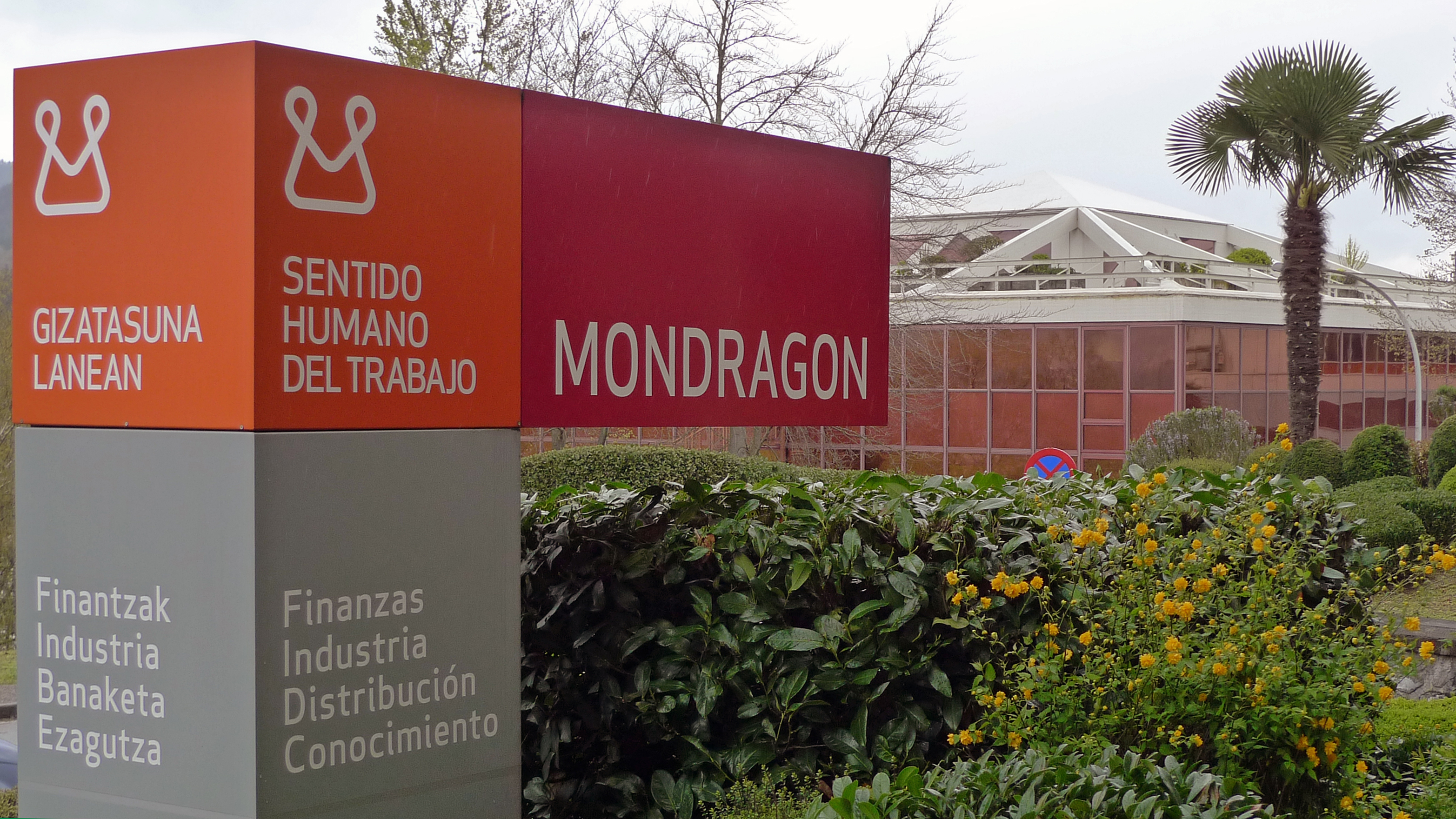 Coincidiendo con el año internacional de las cooperativas visitamos la más grande del mundo, la Corporación Mondragón. Mikel Lezamiz, Responsable de Difusión Cooperativo en Mondragón Corporation, nos contó la evolución de la cooperativa y nos dió un tour por las instalaciones, incluyendo la fábrica de Fagor.